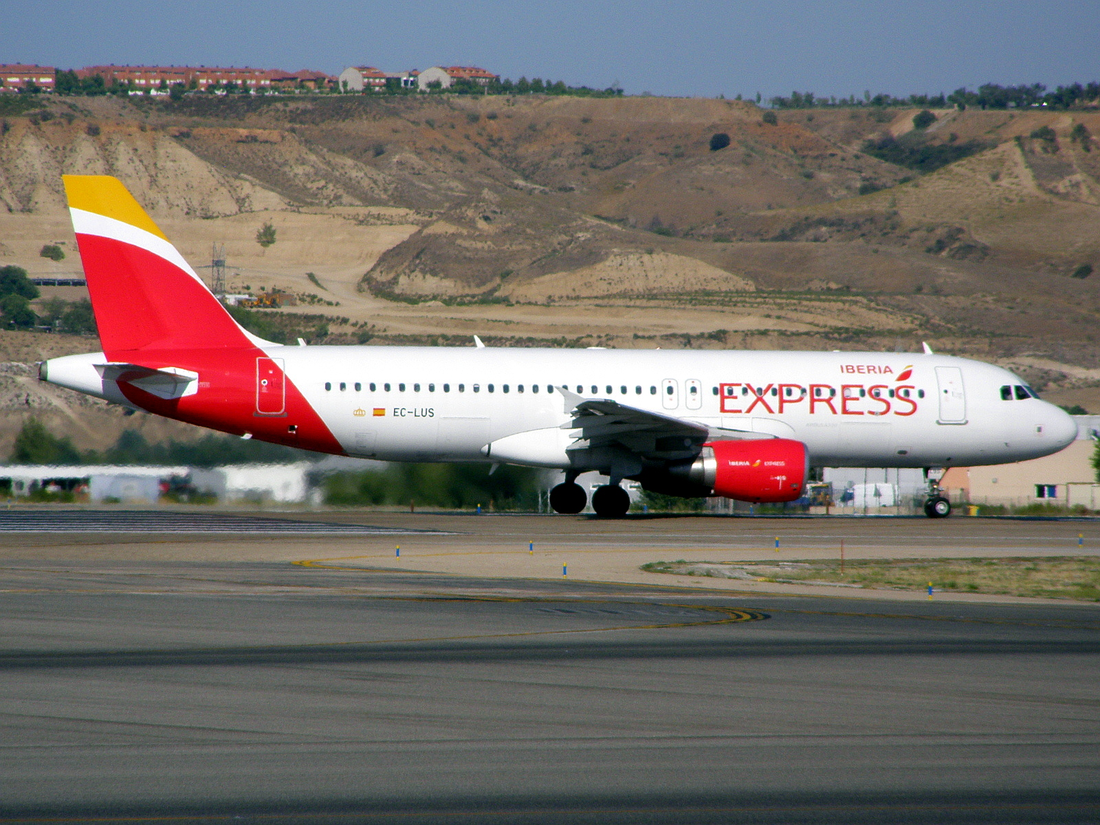 Airbus A320-216 de Iberia Express (EC-LUS) a punto de despegar del aeropuerto Adolfo Suárez Madrid-Barajas.